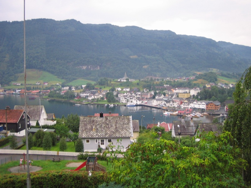 Norheimsund